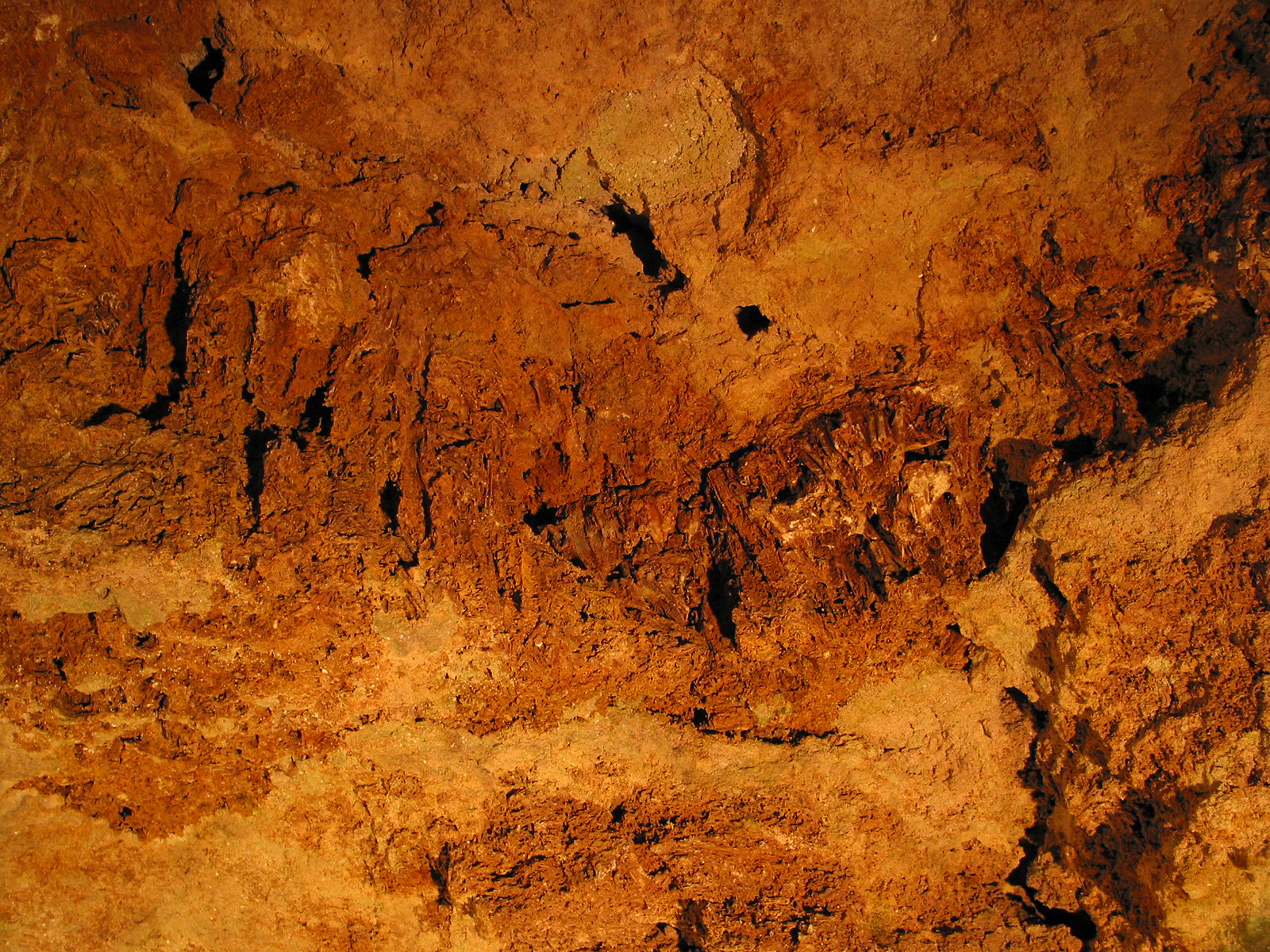 Travertin-Gestein in der Parkhöhle Weimar